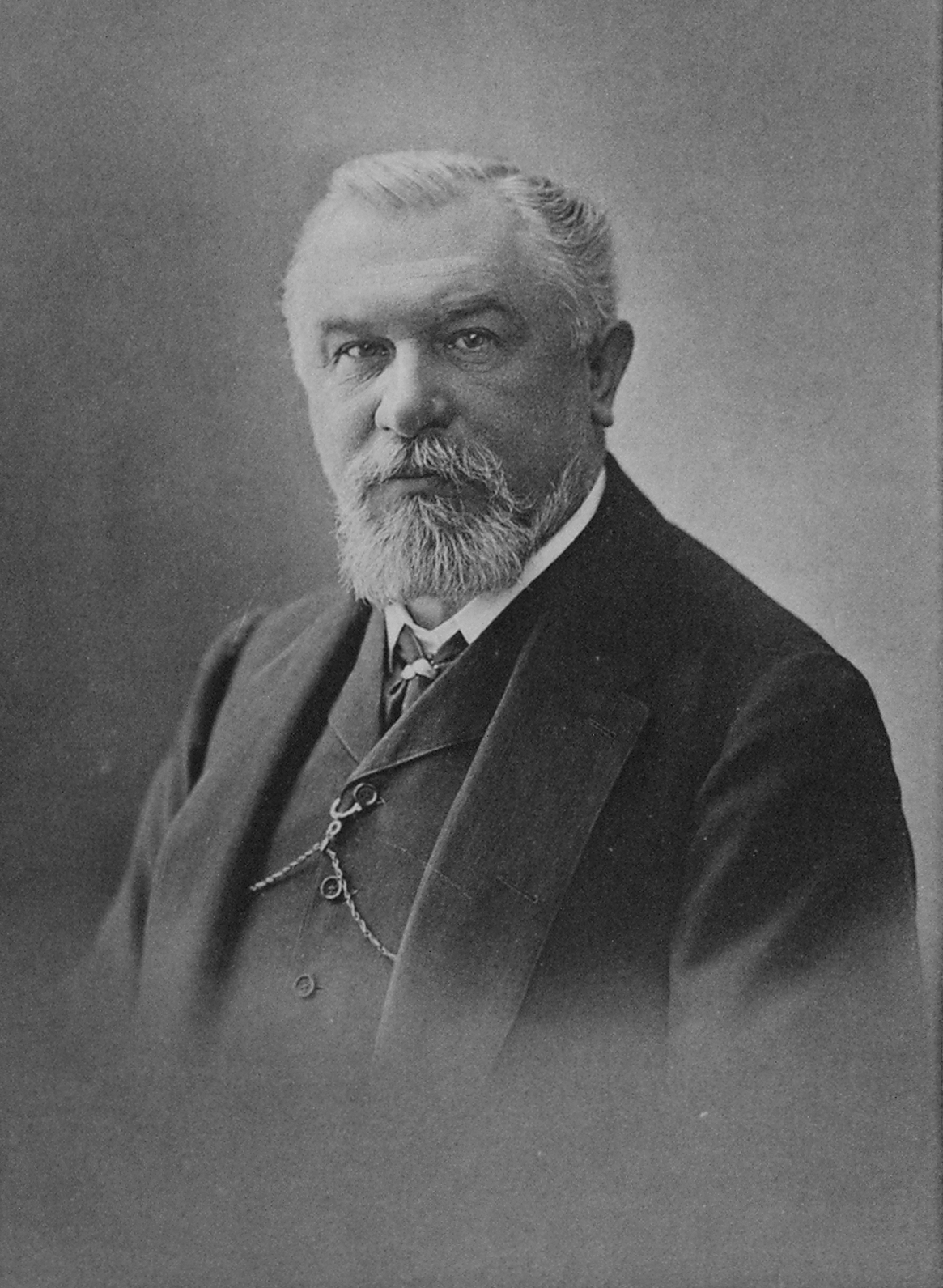 Александр Николович Терещенко, киевский благотворитель и общественный деятель.